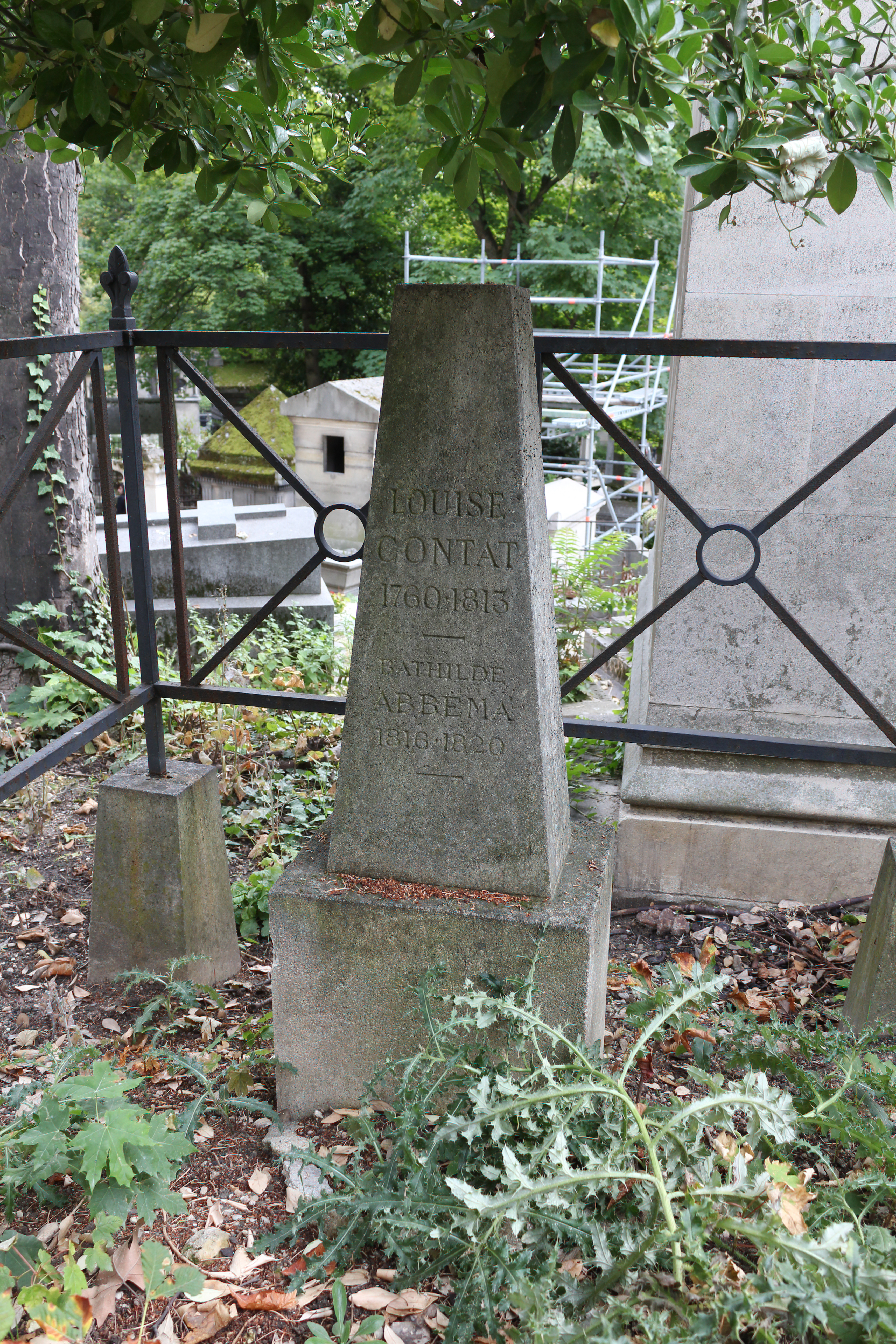 Petit obélisque